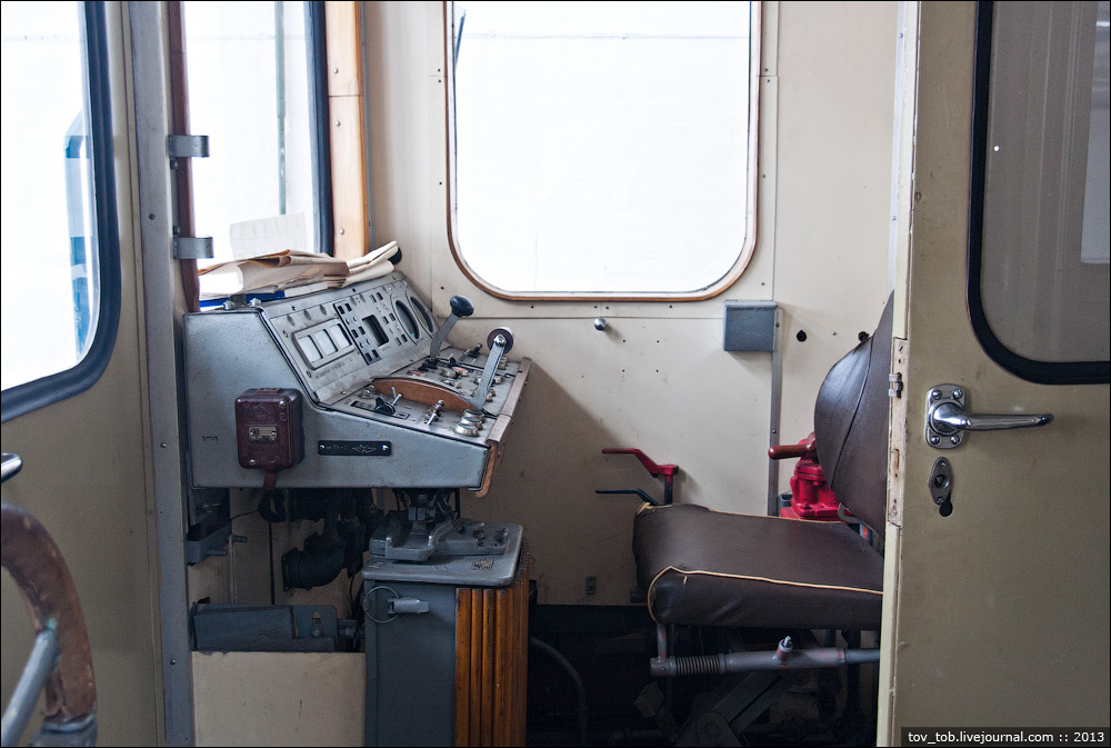 Кабина контактно-аккумуляторного электровоза метрополитена на базе вагона Еж3-5823